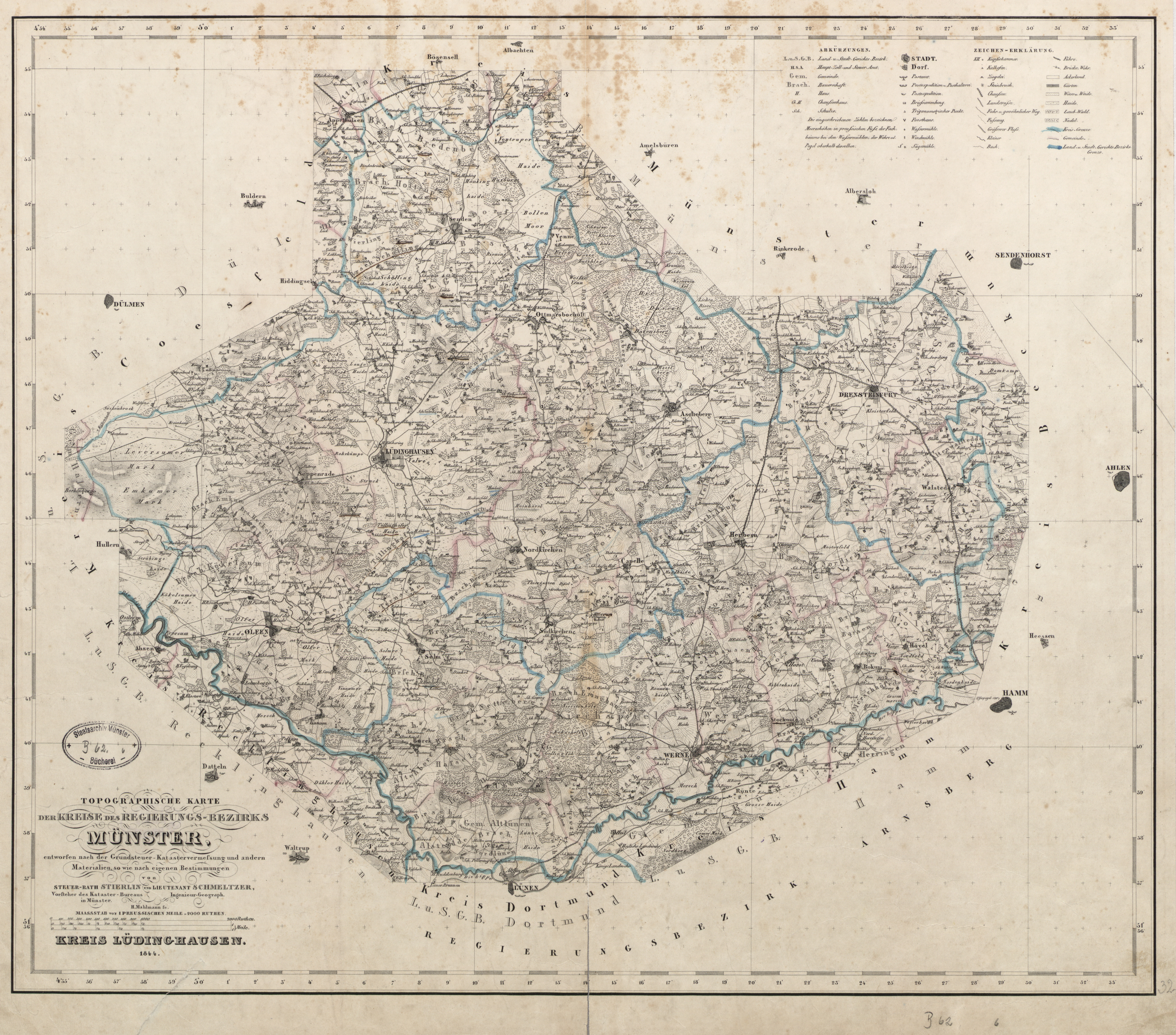 Topographische Karte der Kreise des Regierungs-Bezirks Münster, Blatt 9: Kreis Lüdinghausen, 1844